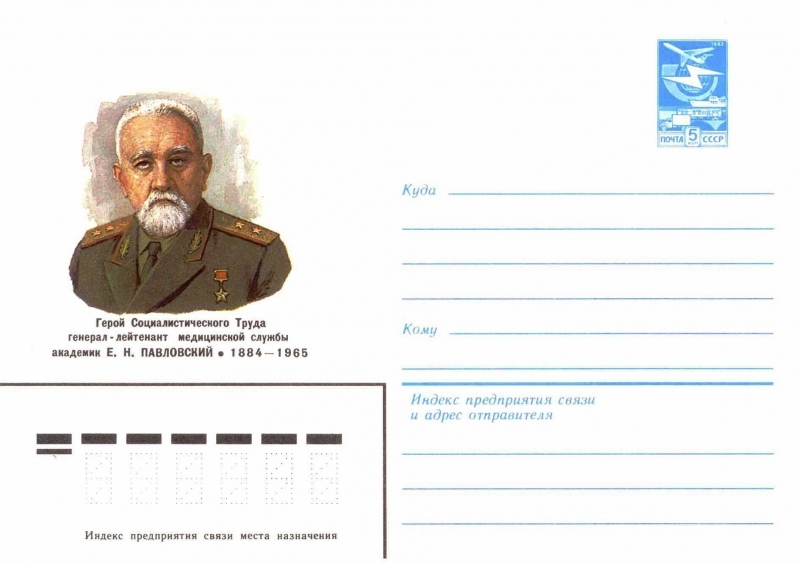 Художественные маркированные конверты 1983 года.